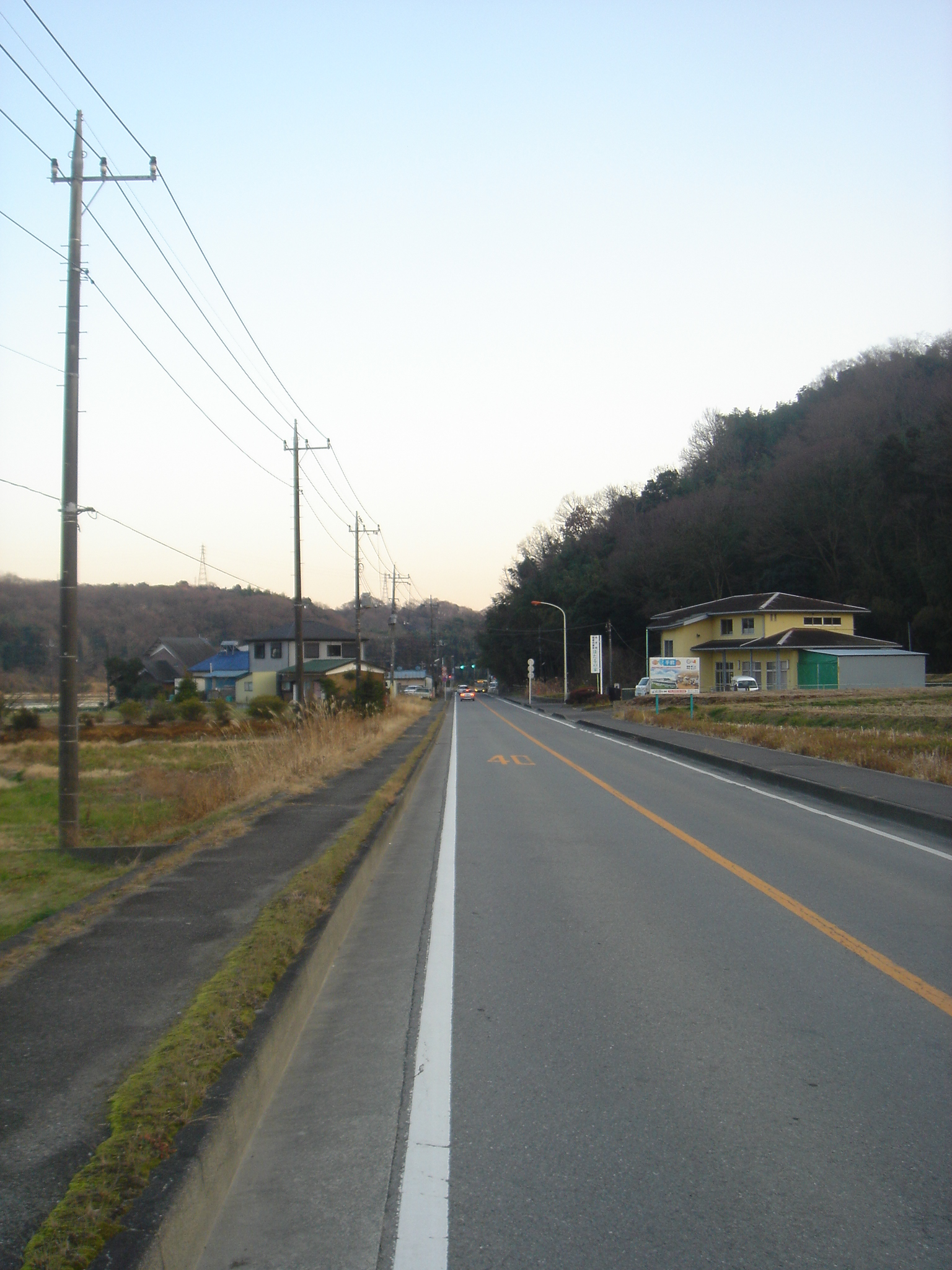 Nakai town